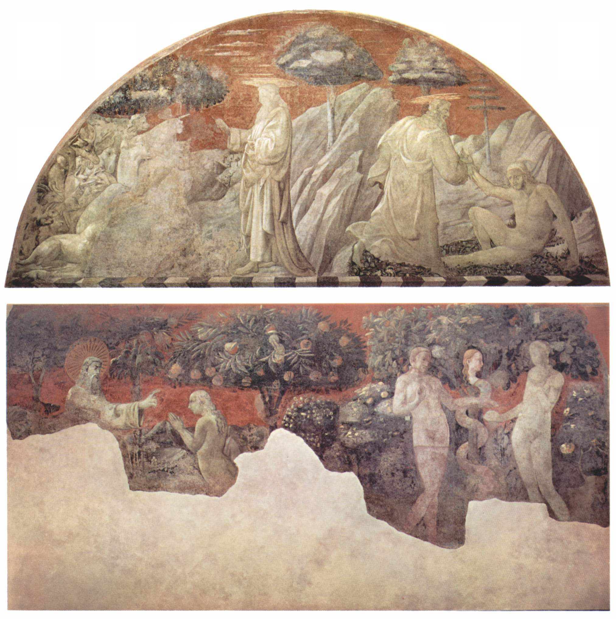 Alttestamentarischer Freskenzyklus zur Genesis im Kreuzgang von Santa Maria Novella in Florenz, Szene in Lünette: Erschaffung der Tiere und Erschaffung Adams, Szene Wandfeld: Erschaffung Evas und Ursünde, Fragmente